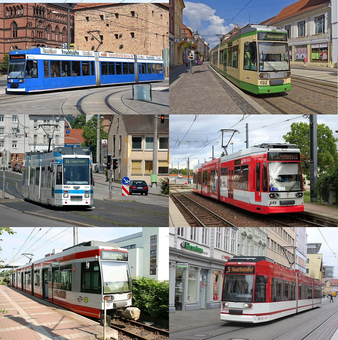 Kolaż zdjęć tramwajów typu MGT6, NGT6 oraz NF6